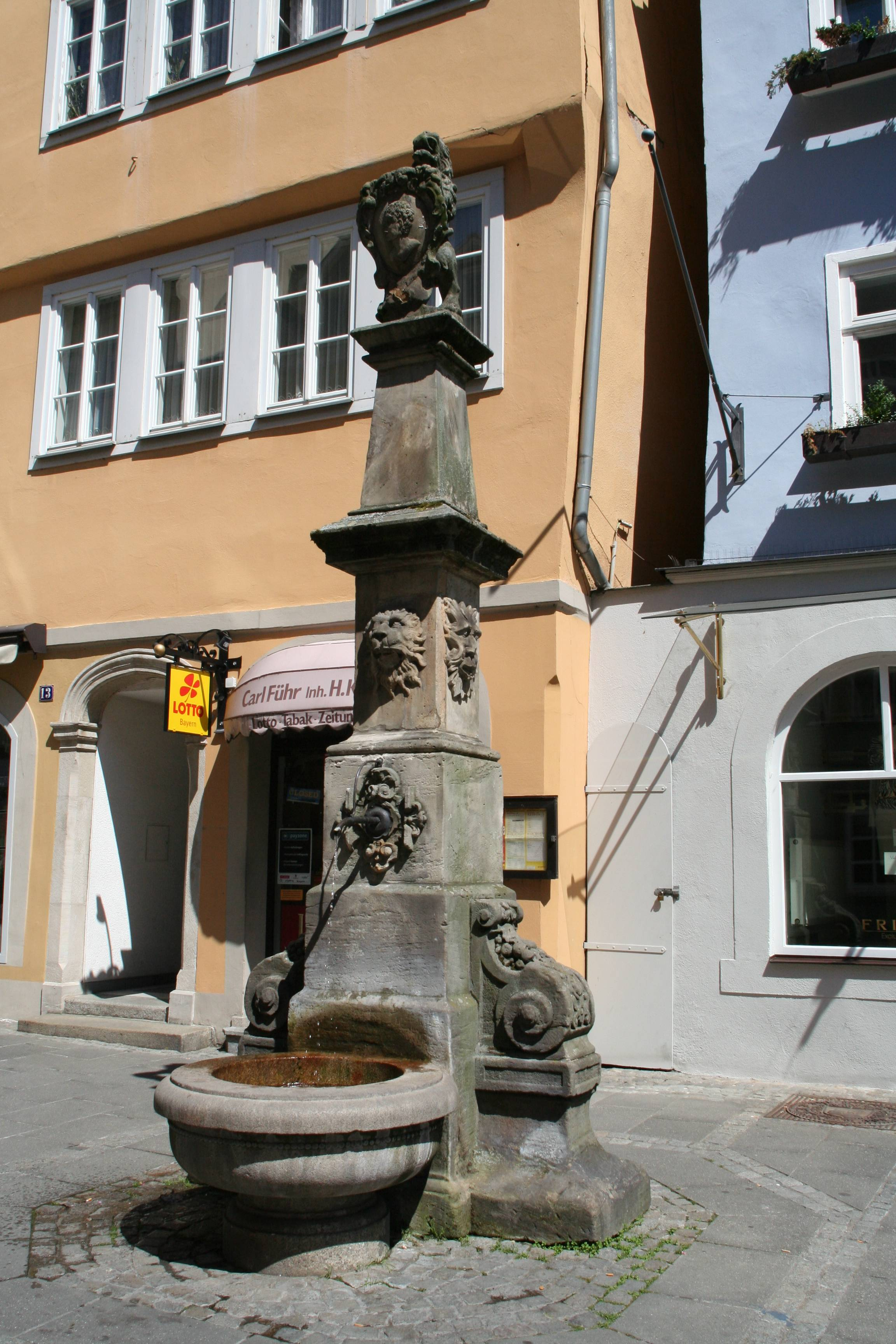 Brunnen bei Ketschengasse 13-15 in Coburg